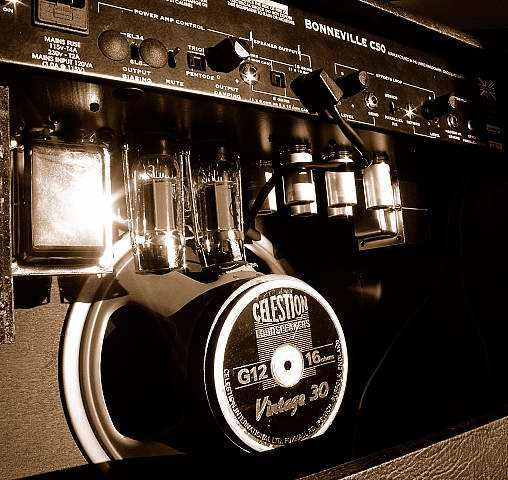 Trace Elliot Bonneville rear view